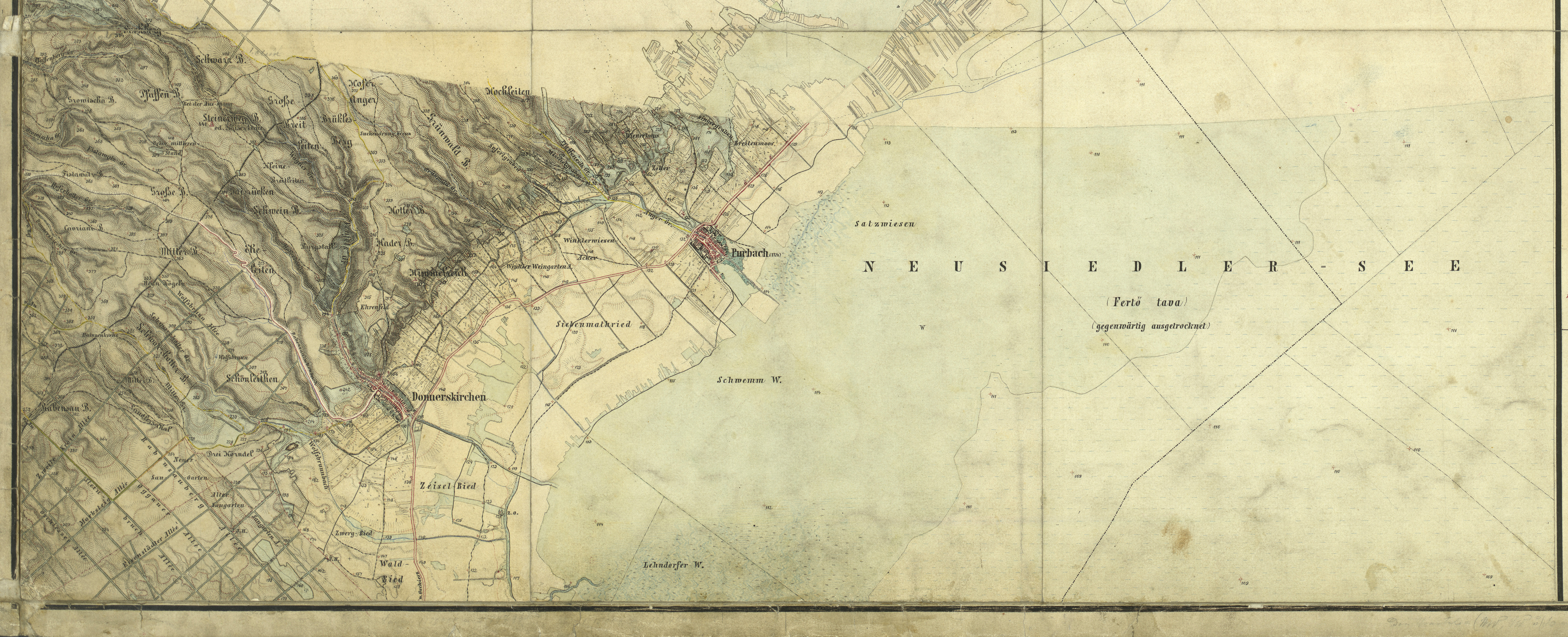 historische Landkarte: Ausschnitt für Purbach und Donnerskirchen aus: Gradkartenblatt Zone 14 Colonne XV Section b (später 4857/2), südwestlicher Teil (b3 und b4 bzw. später 2c und 2d) im Maßstab 1:25.000. Nördlicher und östlicher Teil nur schematisch dargestellt (siehe dazu die gesonderten Blätter 4857/2a bis 2d im Maßstab 1:12.500). Franzisco-josephinische (3.) Landesaufnahme der österreichisch-ungarischen Monarchie. Aufnahmeblatt 1:25.000.